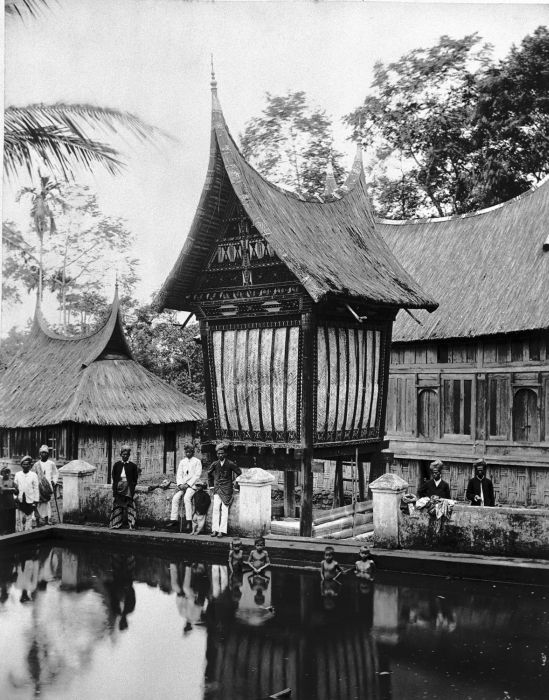 Foto. Rijstschuur en visvijver in Batipoe di Atas in de Padangse Bovenlanden, Sumatra`s Westkust